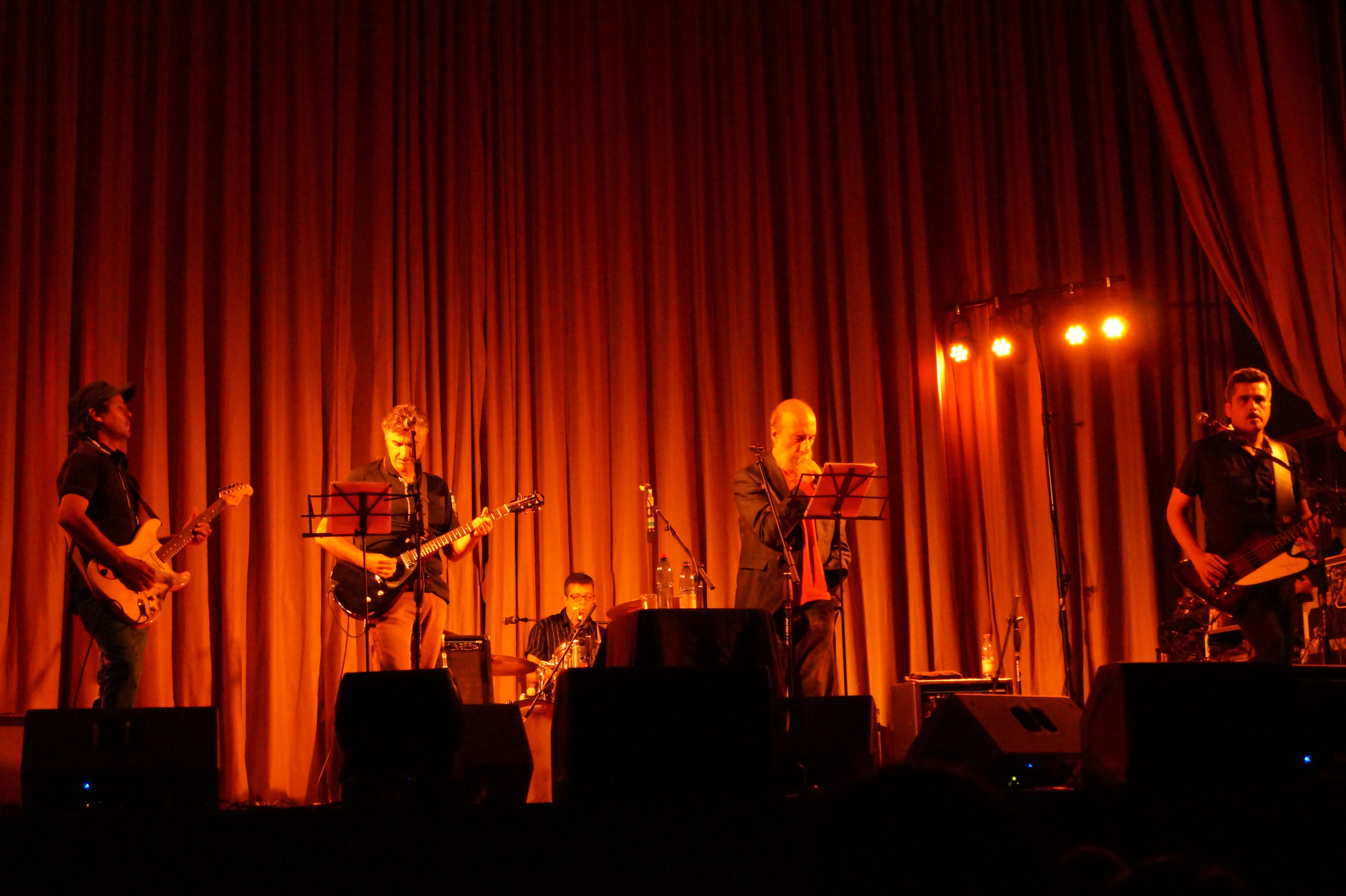 Presentación de Raúl Zurita + González y Los Asistentes Aula Magna de la Universidad de Valparaíso Valparaíso, Chile 27 de enero de 2017